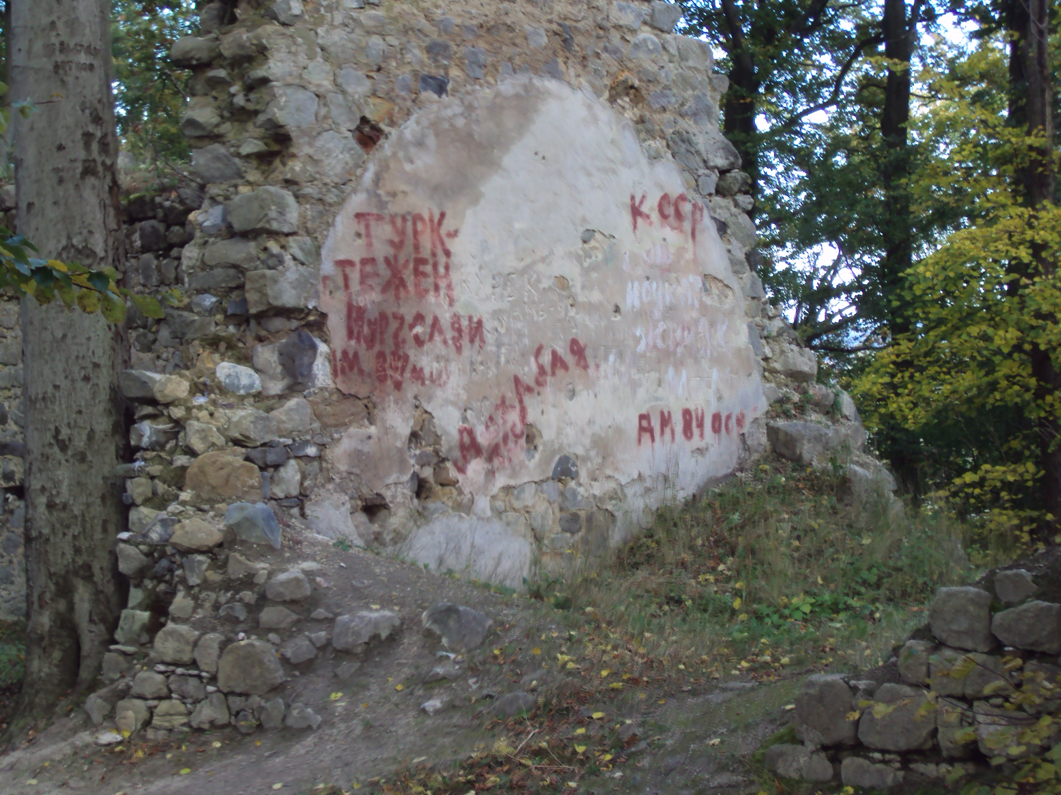 Ruské nápisy, zřícenina hradu Děvín u Hamru na Jezeře byla v okupačním vojenském pásmu